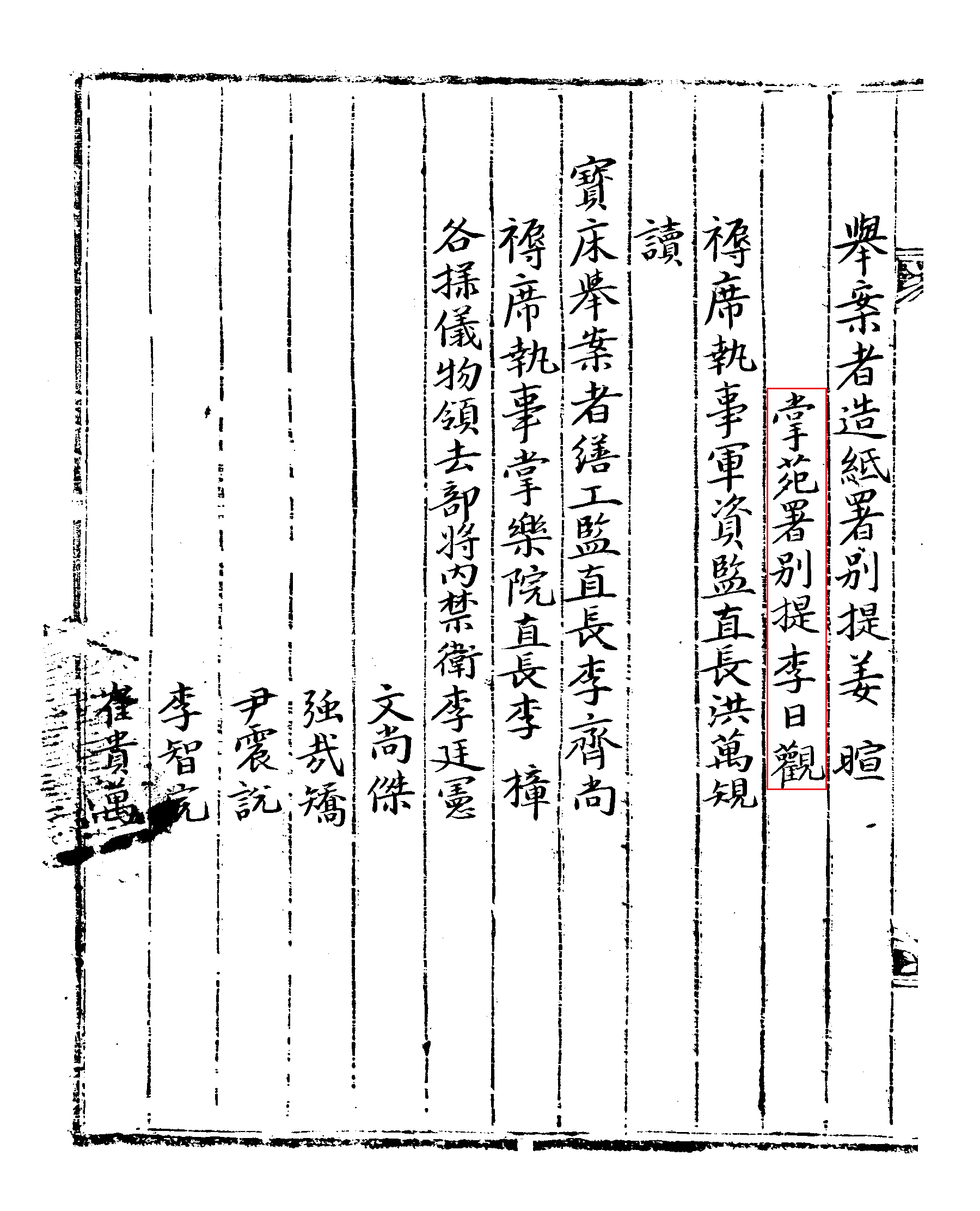 1690년 조선 경종의 세자책봉 책례도감청 의궤 45b페이지